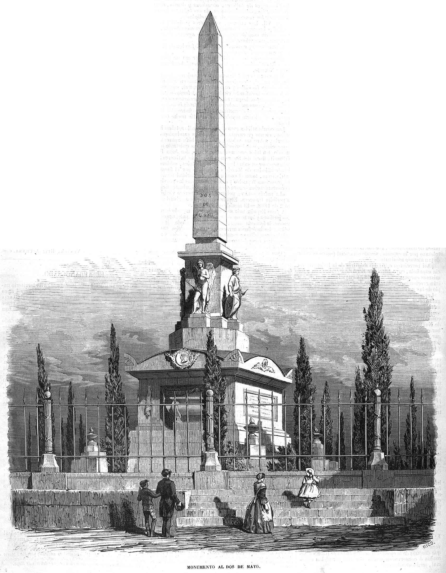 Monumento al Dos de Mayo, en la revista española El Museo Universal.